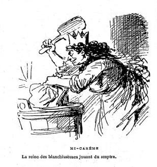 Caricature de la Reine des blanchisseuses par Cham. L'Univers illustré, 8 avril 1876, page 236.